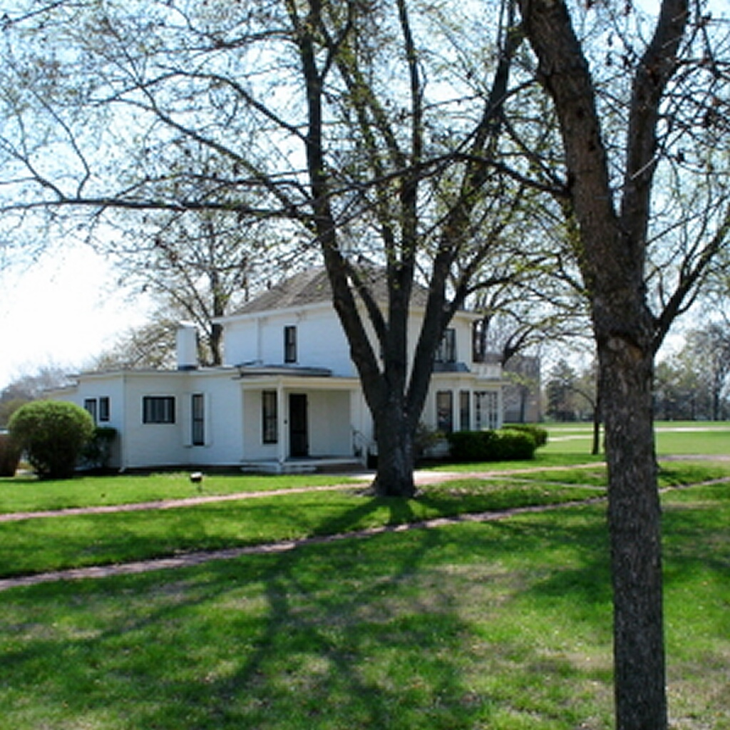 (en) Family house of Dwight D. Eisenhower in Abilene, Kansas(de) Haus der Familie von Dwight D. Eisenhower in Abilene, Kansas